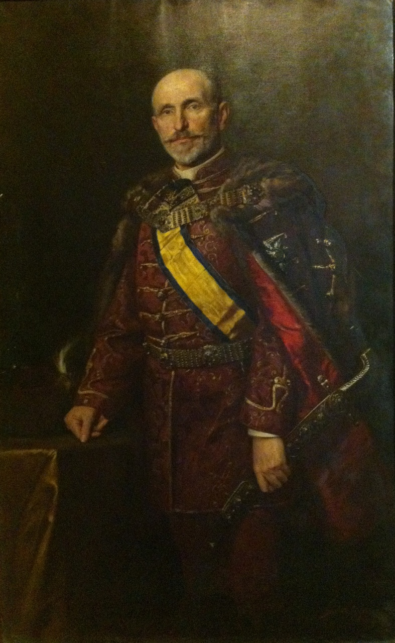 Dániel Ernő magyar vármegyei tisztviselő, ügyvéd, politikus, kereskedelmi miniszter.